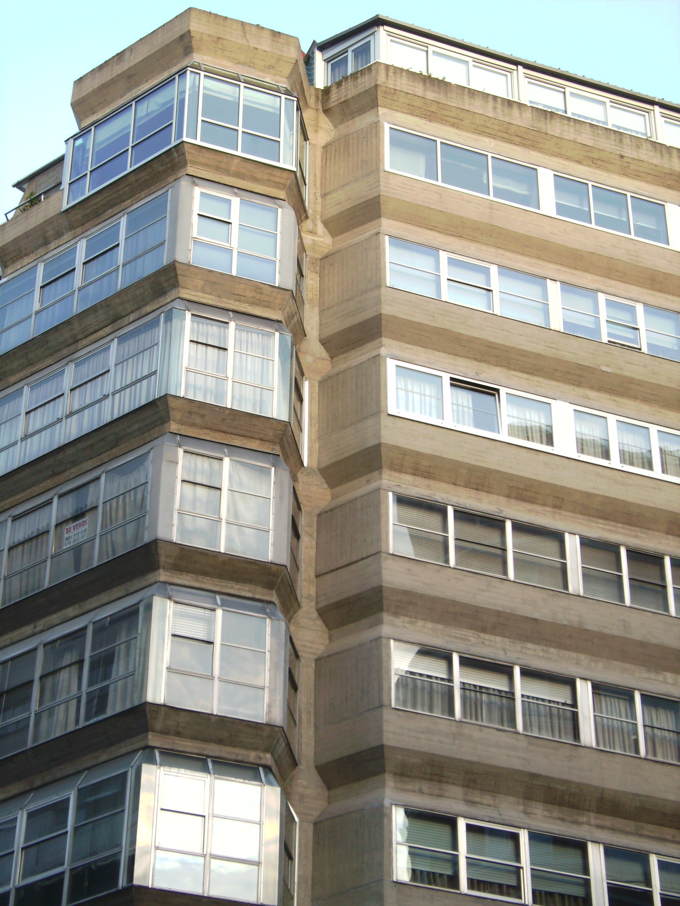 Vivendas e locais comerciais na rúa Juan Flórez da Coruña, obra do arquitecto Carlos Meijide.